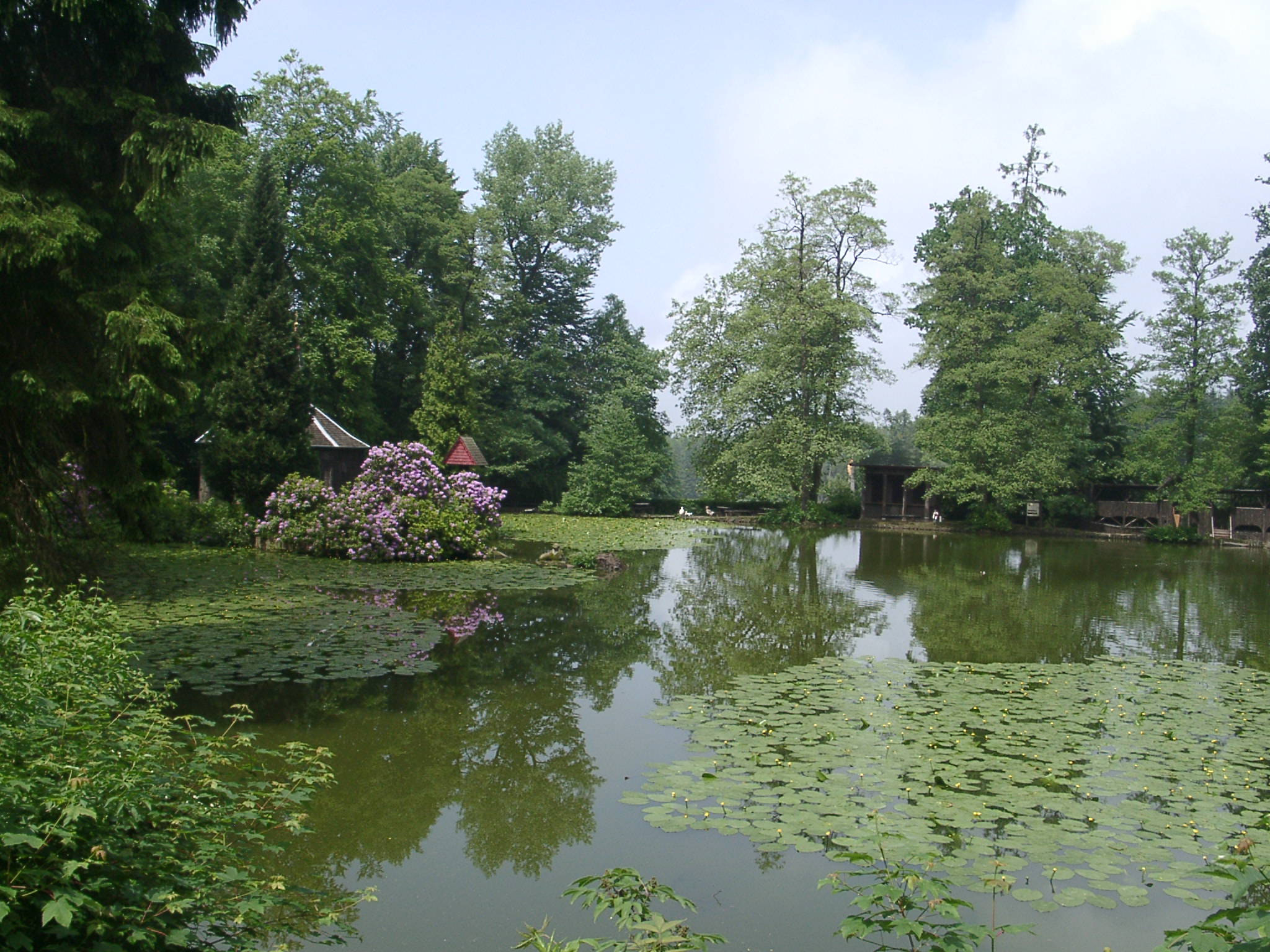 Eulbach, Englischer Garten